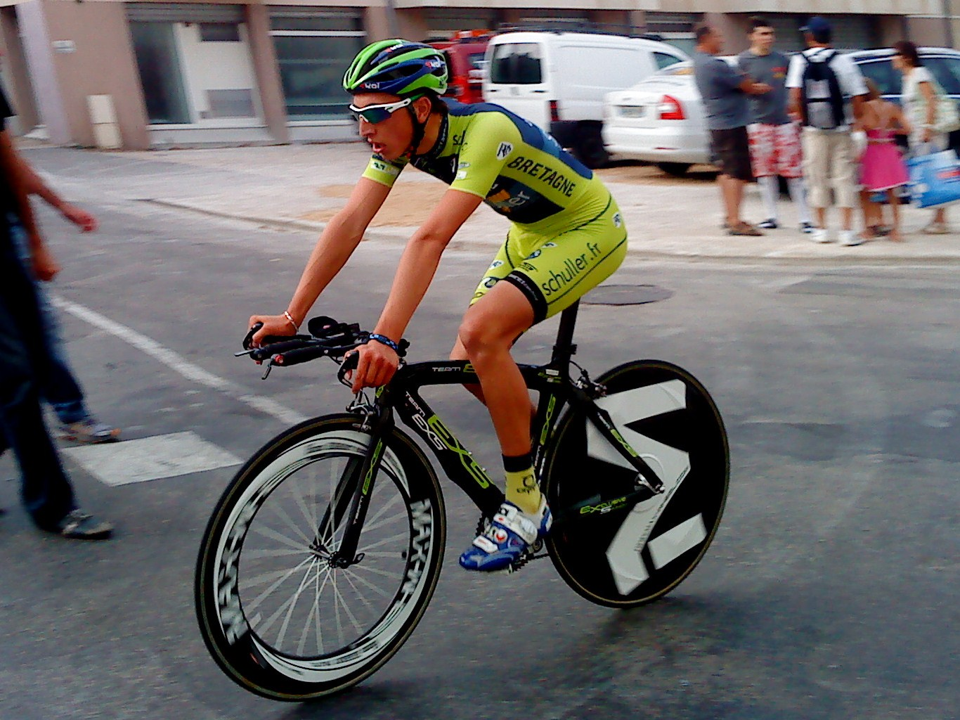 Romain Hardy lors du prologue du Tour de l'Ain 2010